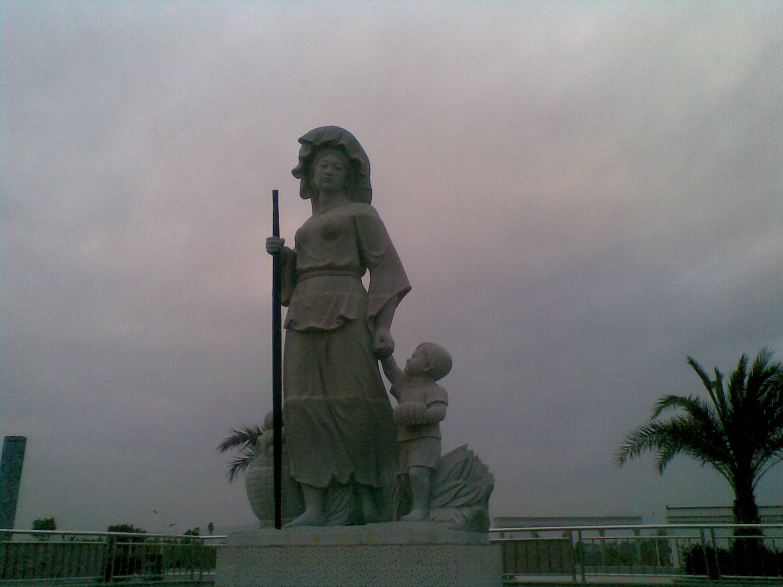 柏塘文化广场客家女雕塑